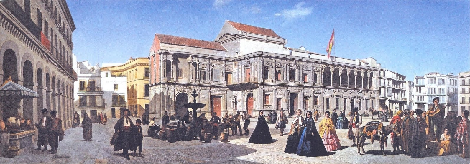 Pintura de aproximadamente 1850 atribuida erróneamente a Virgilio Mattoni. Muestra la Plaza San Francisco de Sevilla, donde se aprecia el Ayuntamiento y sobre él la estructura del antiguo convento de San Francisco, derribado en el siglo XIX. Donde se encuentra la fuente entonces se encontraba la Pila del Pato y hoy se encuentra la Fuente de Mercurio. A la derecha está la entrada a la calle Sierpes y a la izquierda edificios donde actualmente se encuentra la sede en Sevilla del Banco de España